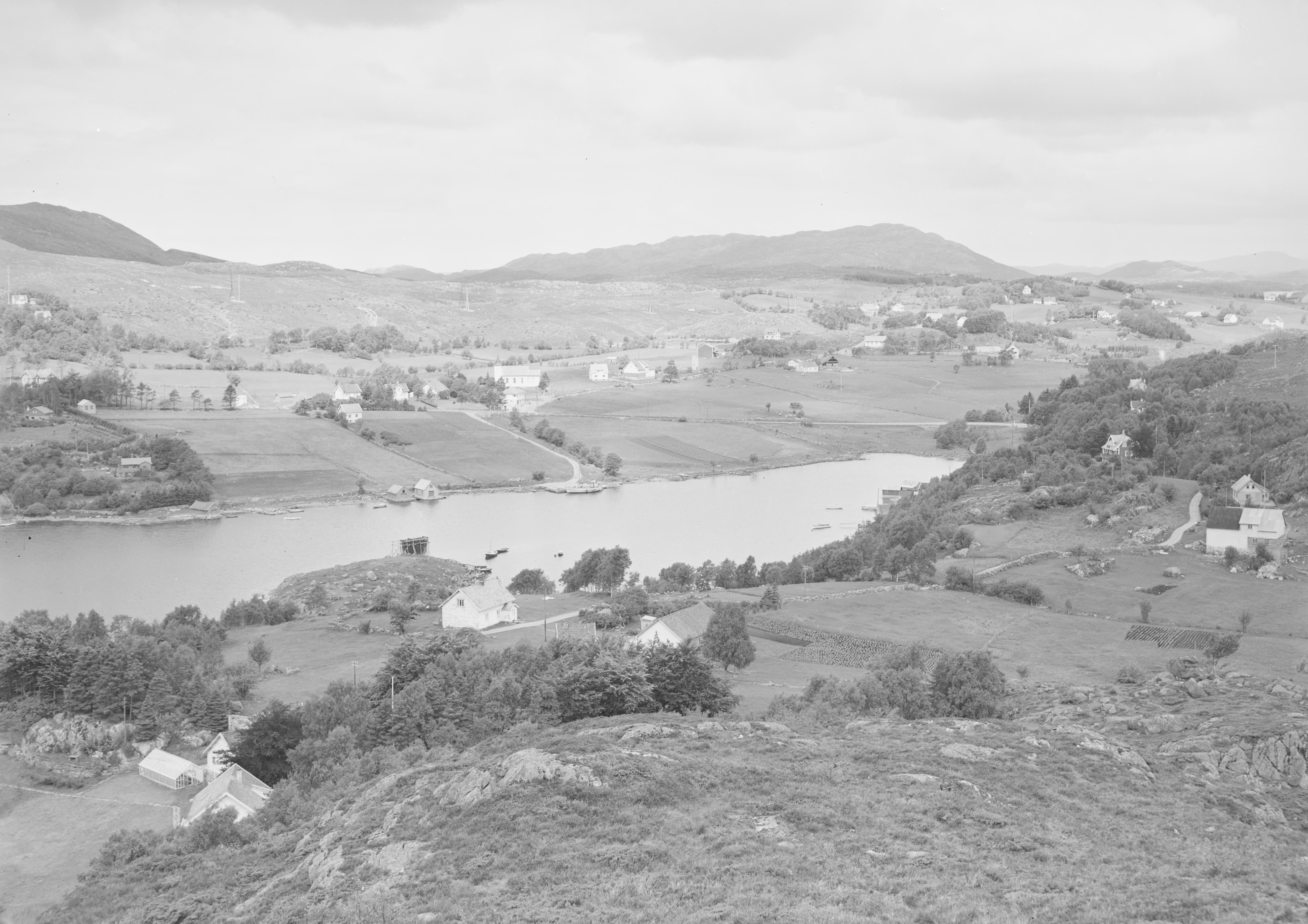 Bildet er hentet fra Nasjonalbibliotekets bildesamling. Anmerkninger til bildet var: Fotograf ukjent. Førre, Tysvær, Rogaland